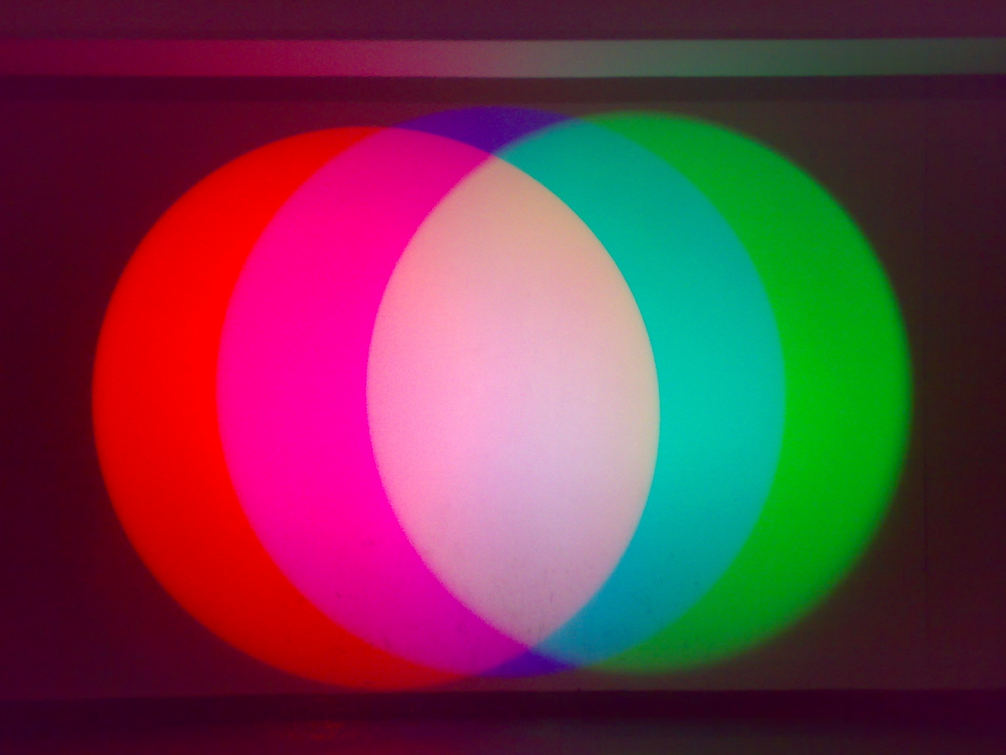 Colours